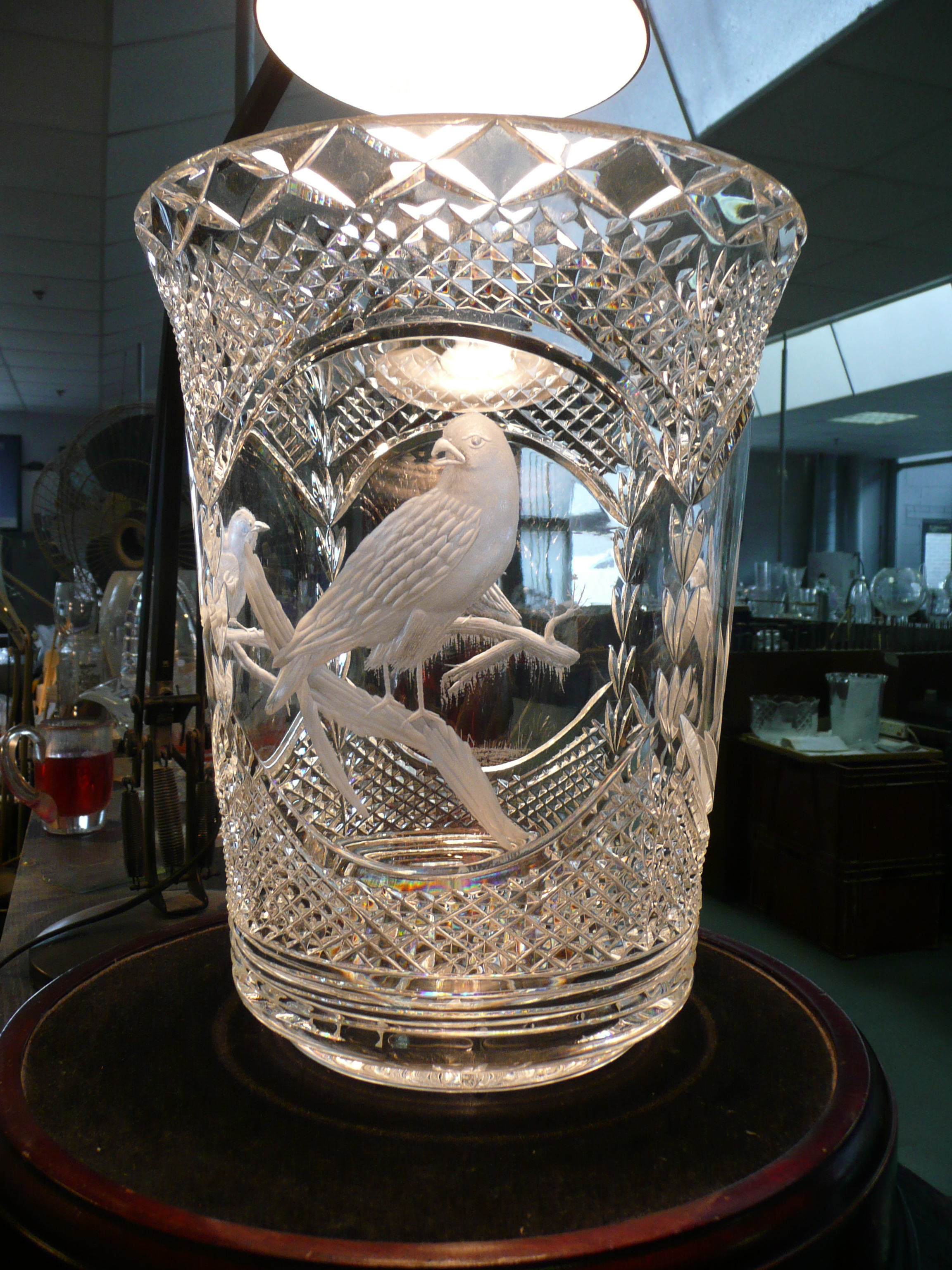 Waterford Crystal engraved glass